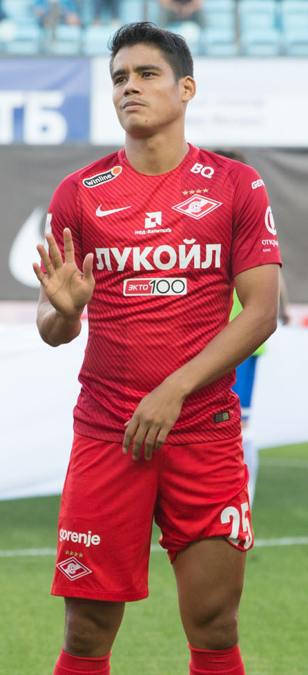 «Динамо» - «Спартак»